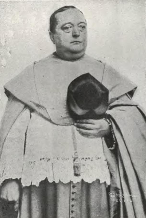 José Roca y Ponsa, magistral de Sevilla